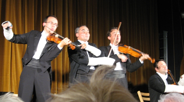 Grupa MoCarta